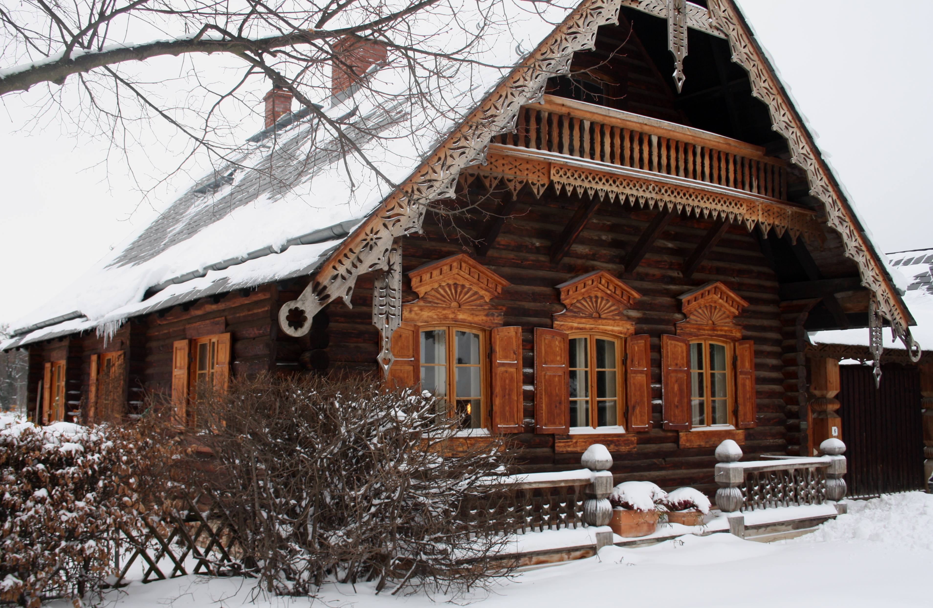 Russische Kolonie Alexandrowka, Entstehung 1826/27